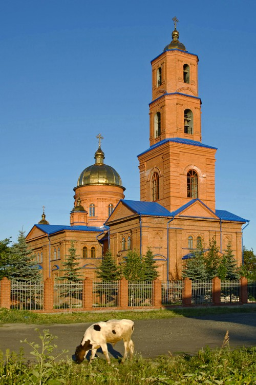 Tempel der Einführung der Jungfrau Maria in den Tempel von Jerusalem